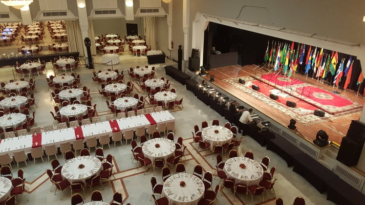 Photo de la salle Royale durant le congrès International de la Justice en Avril 2018